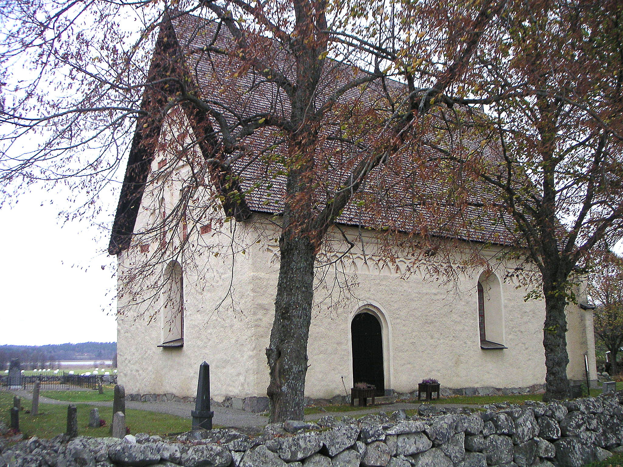 Fittja kyrka, Enköpings kommun